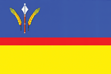 Прапор_Ясинуватського_району